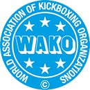 wako.jpg